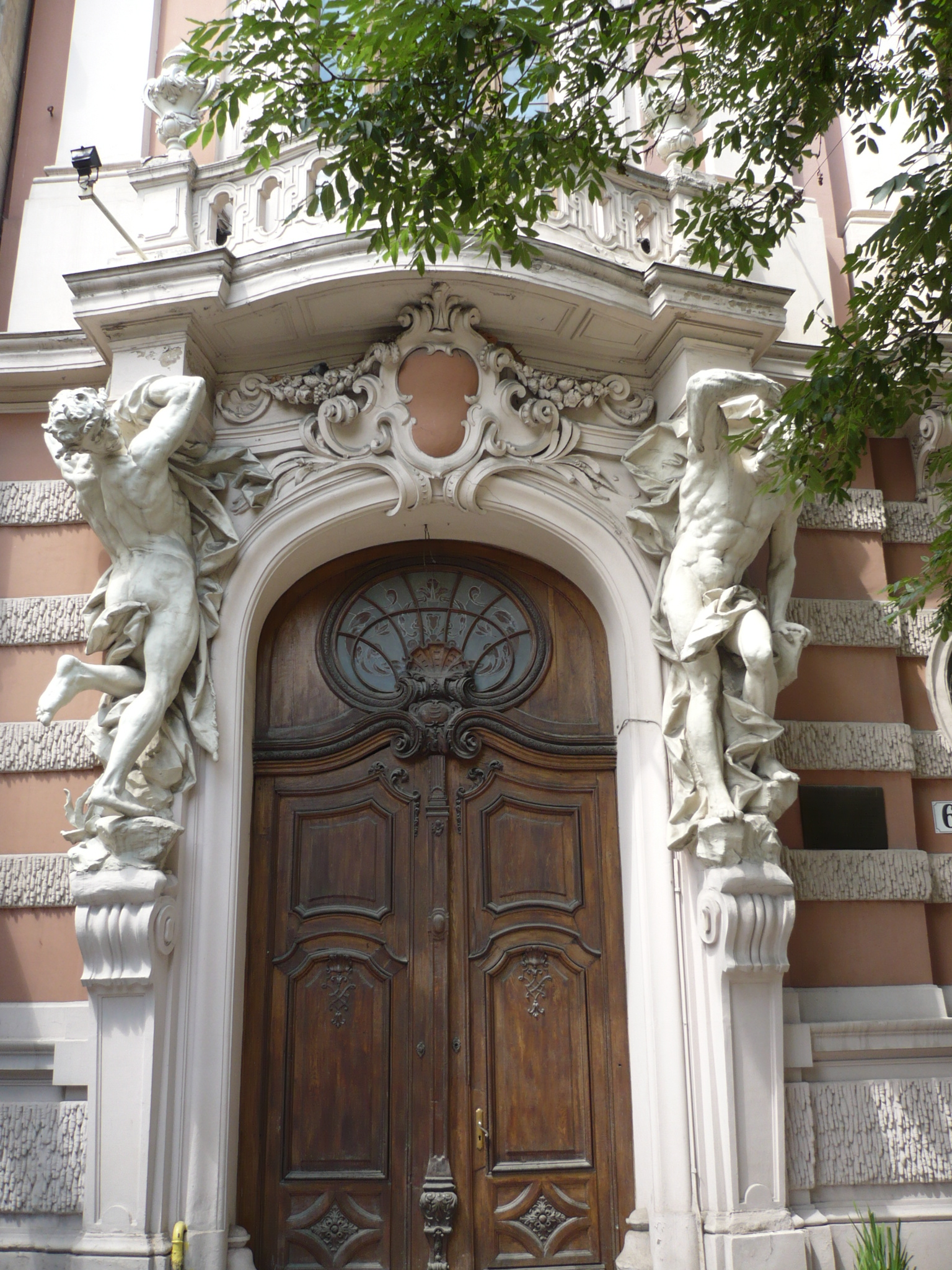 Lwów, ul. Czynu Listopadowego 6 - portal dawnego Kasyna Szlacheckiego, zwanego także: Narodowym, Ziemiańskim, Końskim (zbud. 1897-98). Obecnie Dom Uczonych